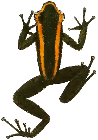 Dessin représentant une Dendrobates aurotaenia.